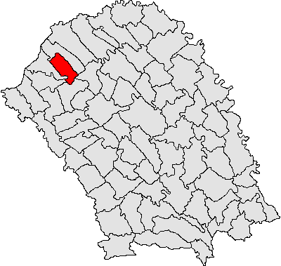 Categorie:Hărţi ale judeţului Botoşani